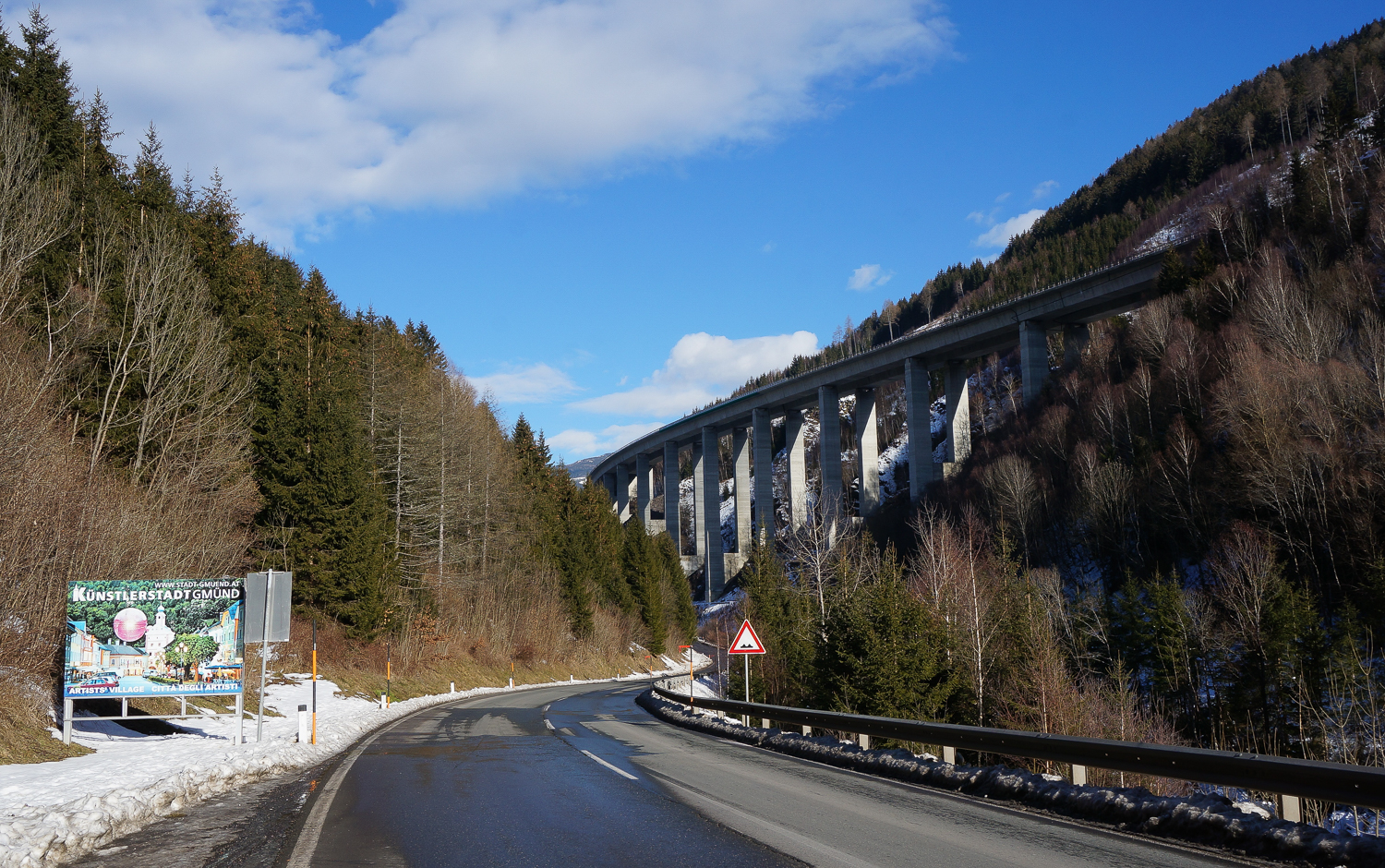 B99 Katschberg Landesstraße von Gmünd in Kärnten nach Richtung Norden Salzburg, mit der parallel verlaufenden Tauern Autobahn A10, Österreich, Europäische Union